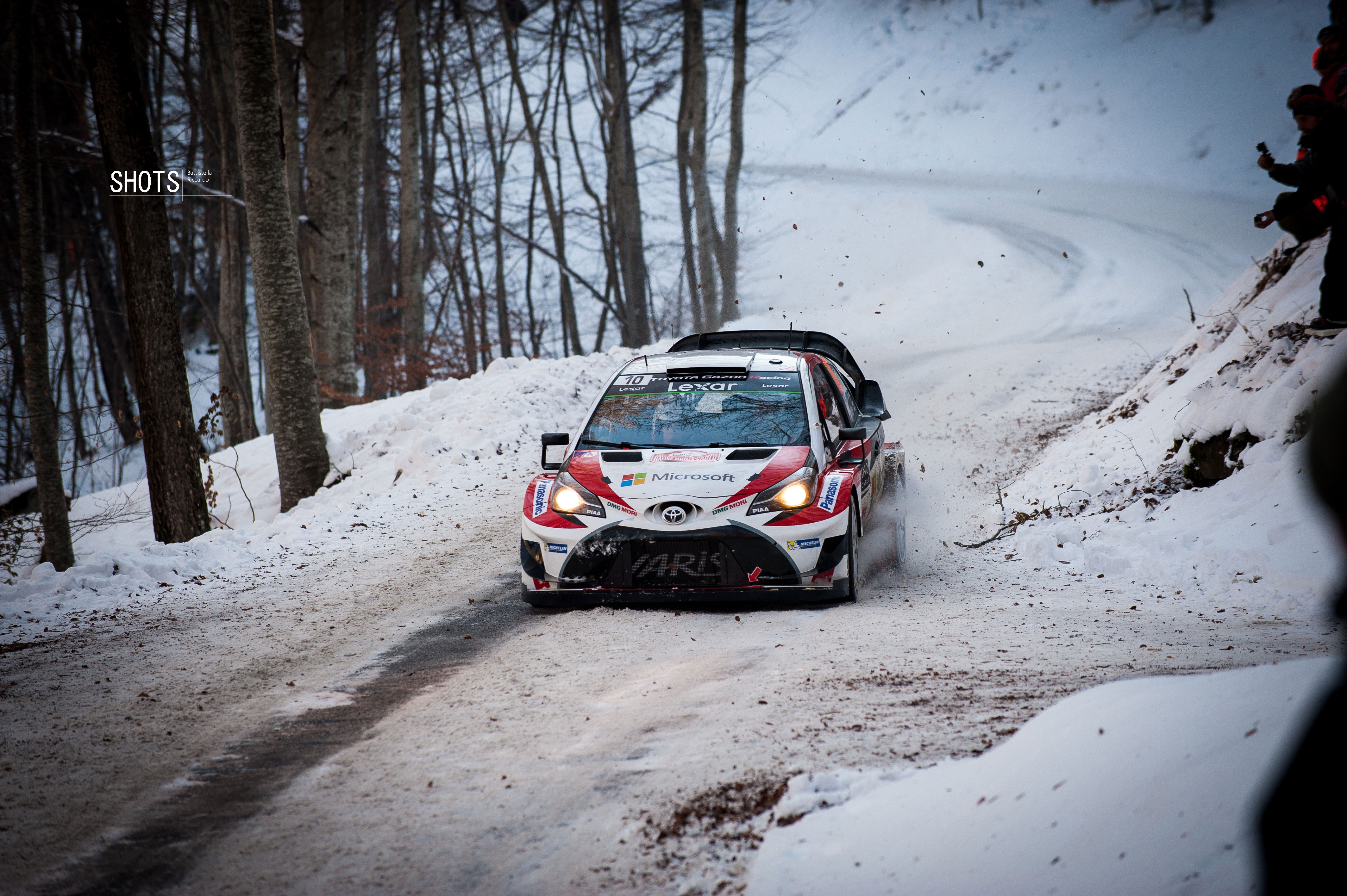 Jari-Matti Latvala lors du Rallye Monte Carlo 2017.